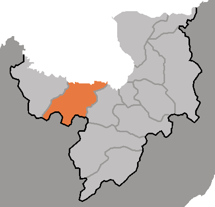 Map of Kimjongsuk, Ryanggan-do, DPRK, 2006